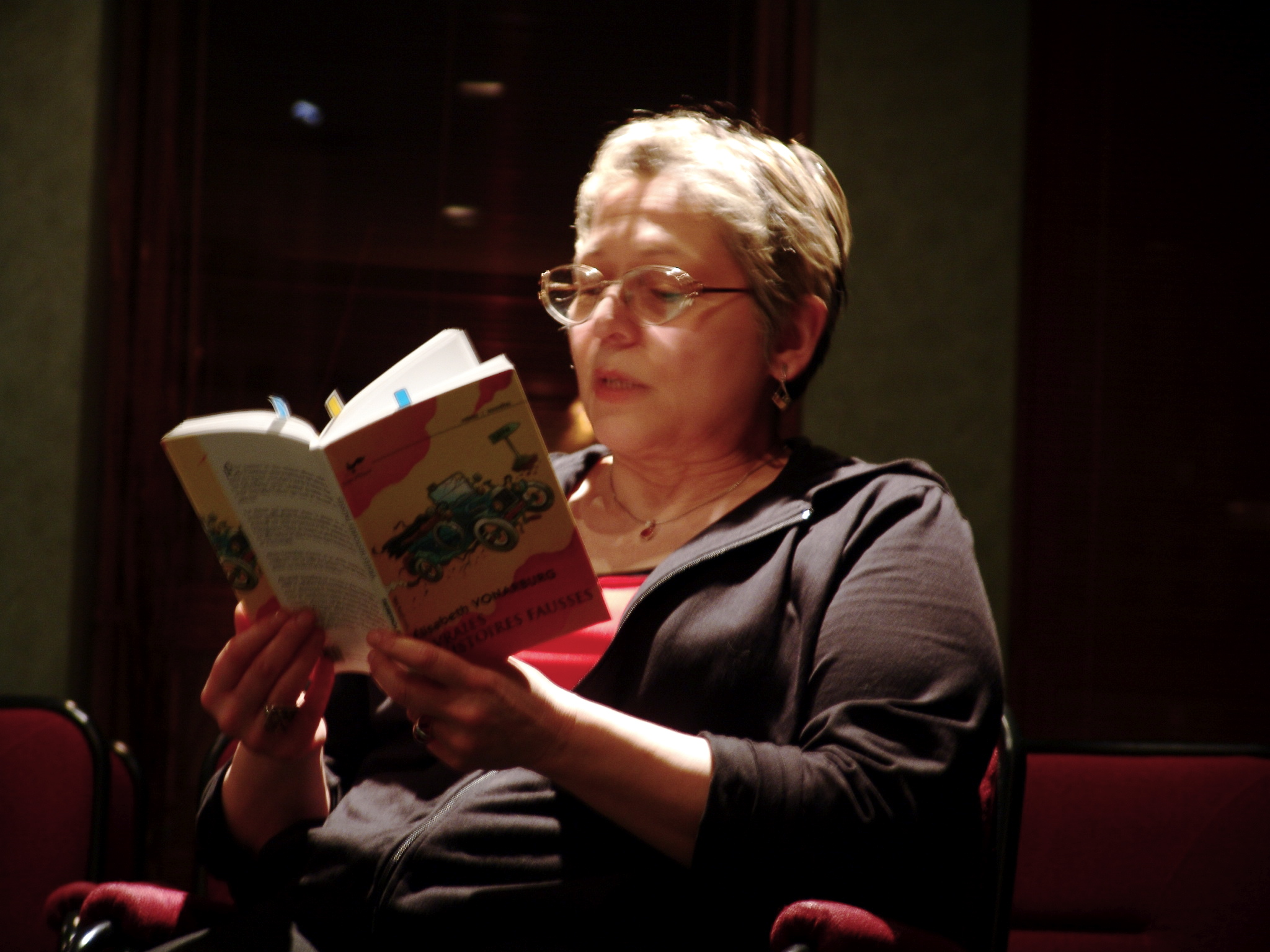 Lecteurs en serie : Elisabeth Vonarburg Congres Boreal 2006